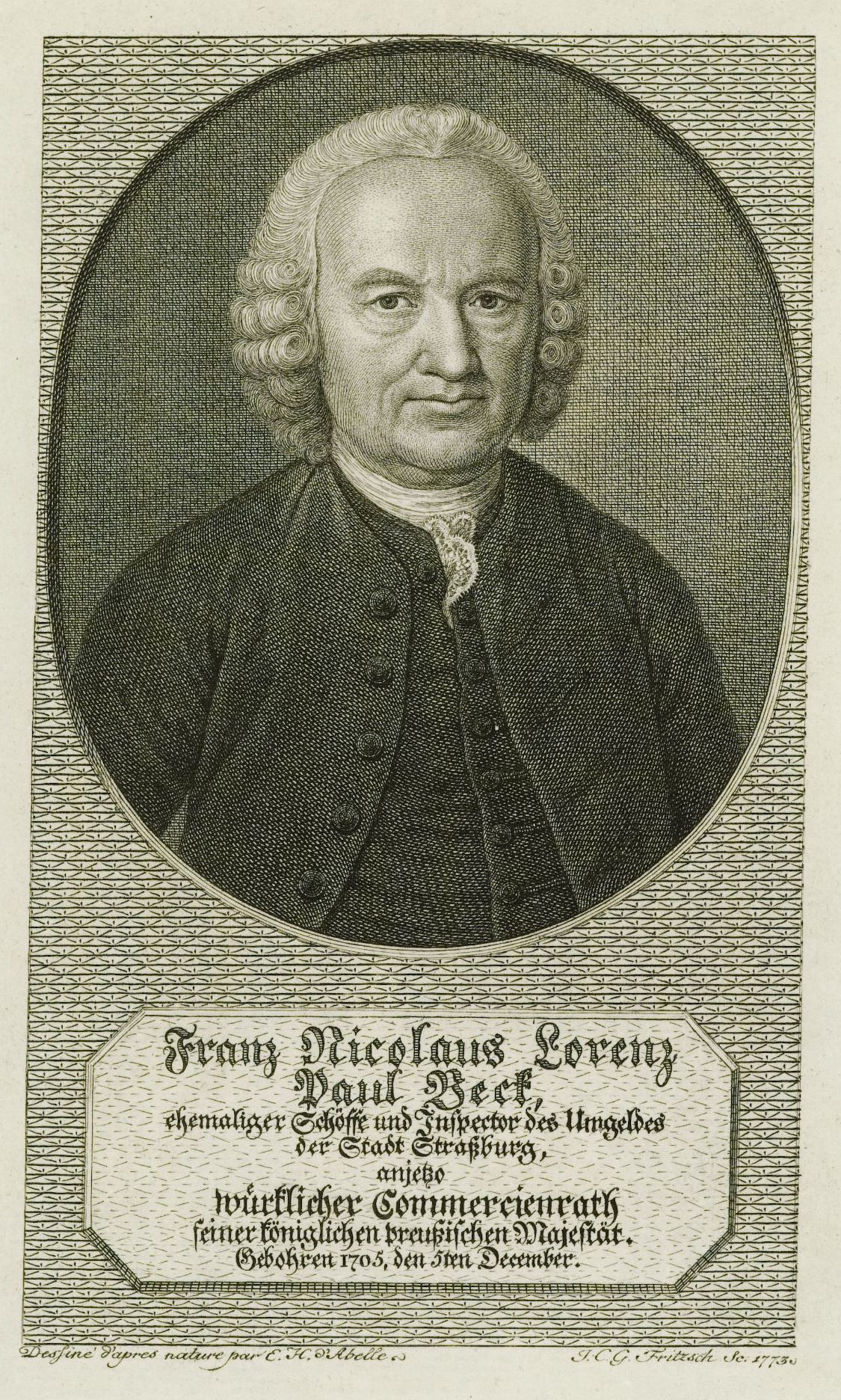 [Bildnis von Franz Nicolaus Lorenz Paul Beck] Sonst. bet. Person Abel, Ernst Heinrich Fritzsch, Johann Christian Gottfried Erscheinungsort [Hamburg] Erscheinungsjahr 1773 [1773] Formale Angaben 16 x 10 cm, Plattengr. 18 x 12 cm 1 Portrait, Kupferstich Besitzer Staats- und Universitätsbibliothek Hamburg Signatur P 21 : B 36 Sammlung Hamburgensien: Portraits Portraitsammlung Graphik